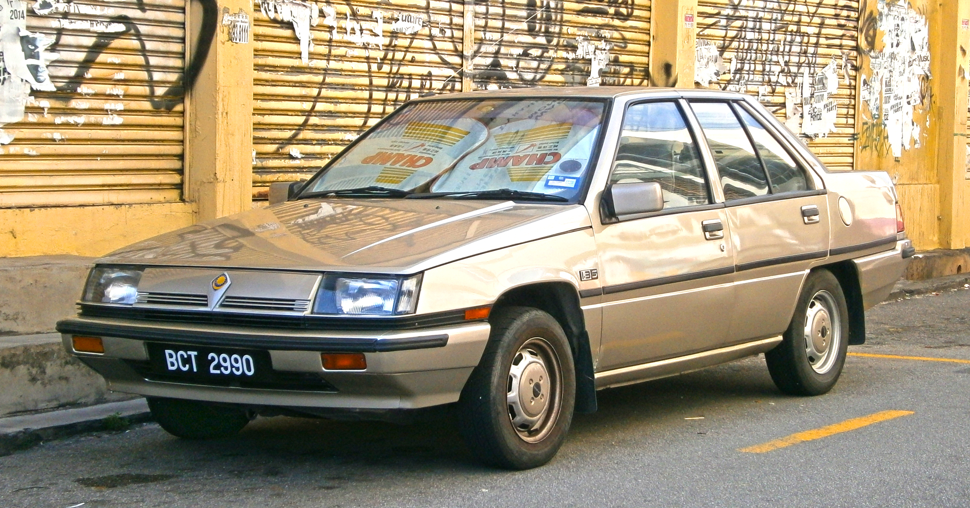 1989 Proton Saga (Magma) 1.3S 4-door saloon